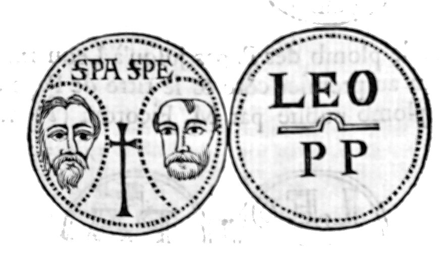 extrait de "Nouveau traité de diplomatique...".